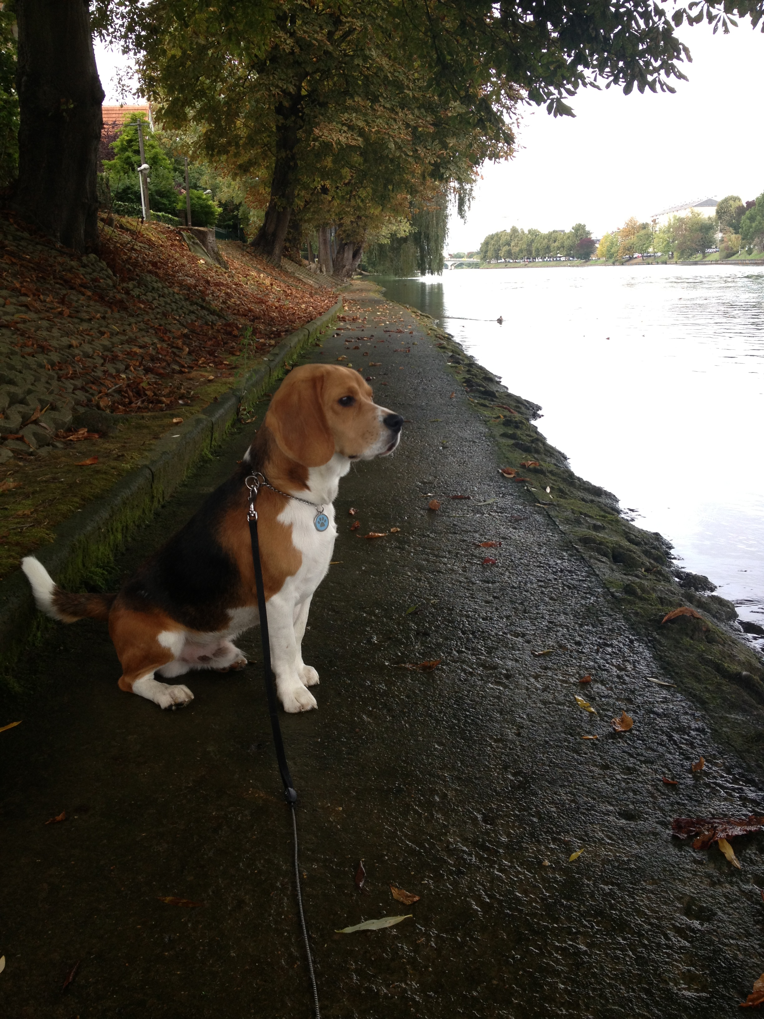 Beagle